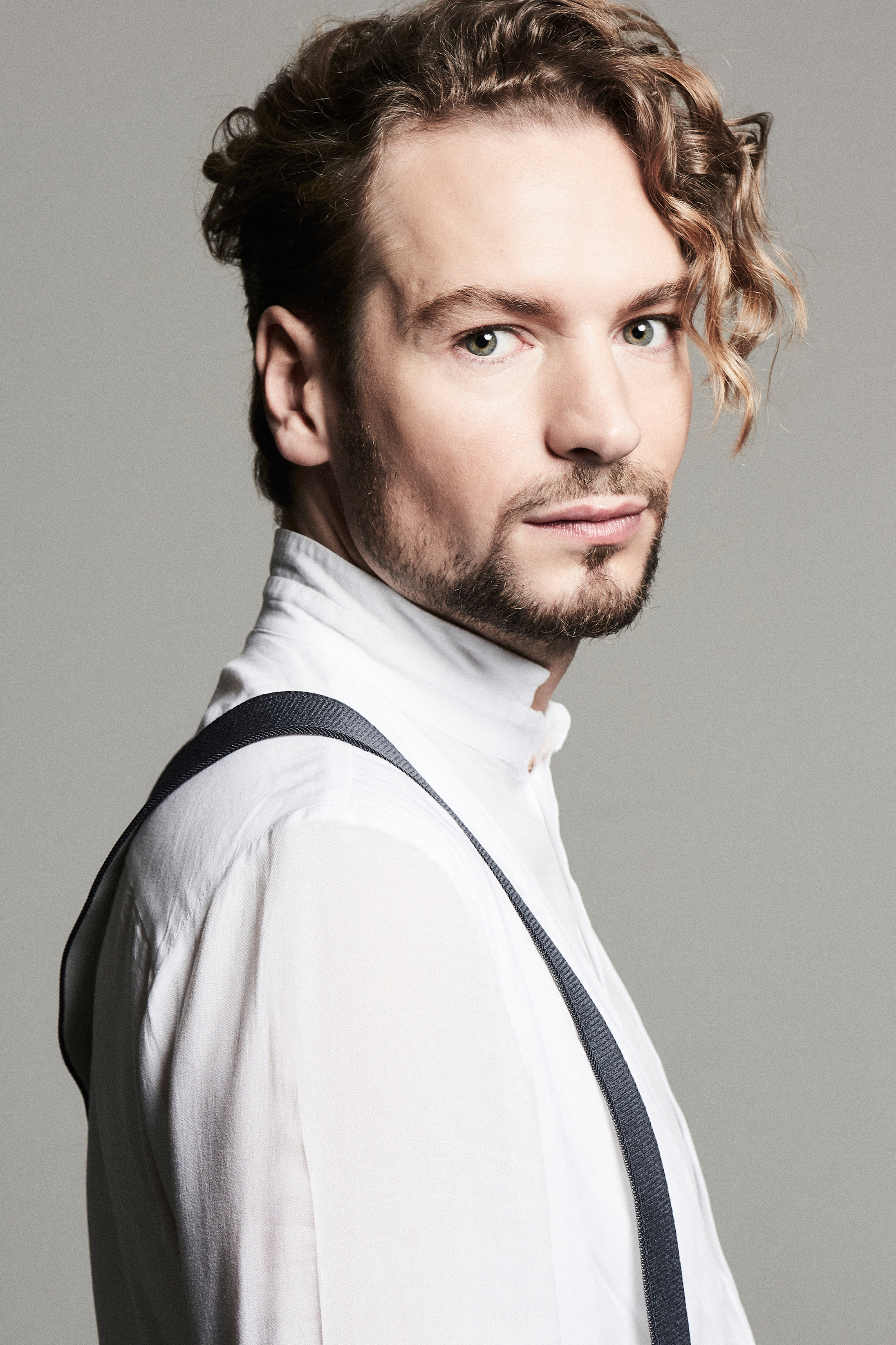 Felix Räuber (Photo: Michael Miklas)